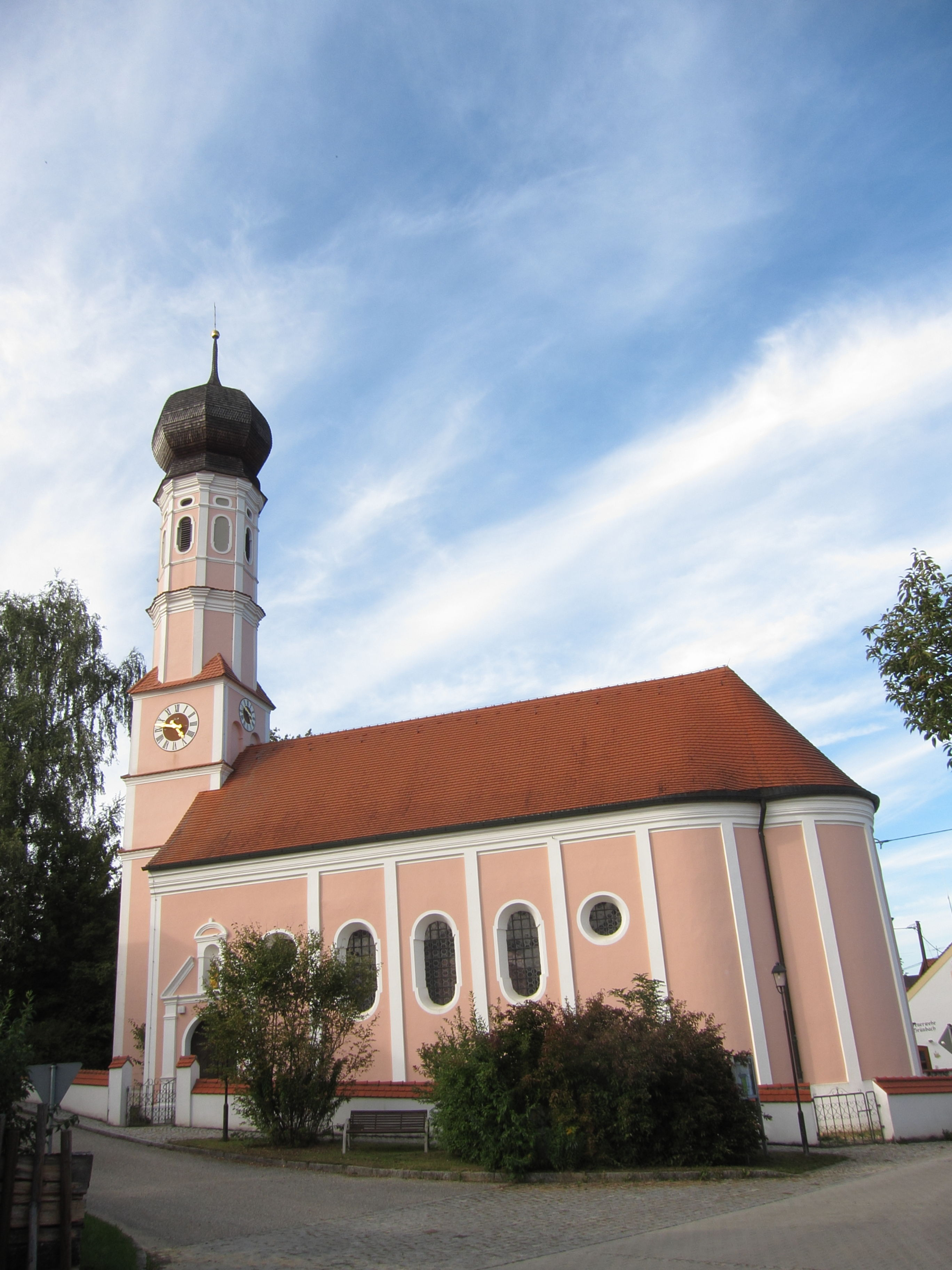 Kath. Filialkirche St. Andreas, barocker Saalbau mit Gruftkirche und Zwiebelturm, wohl von Anton Kogler ab 1688, mit Ausstattung.